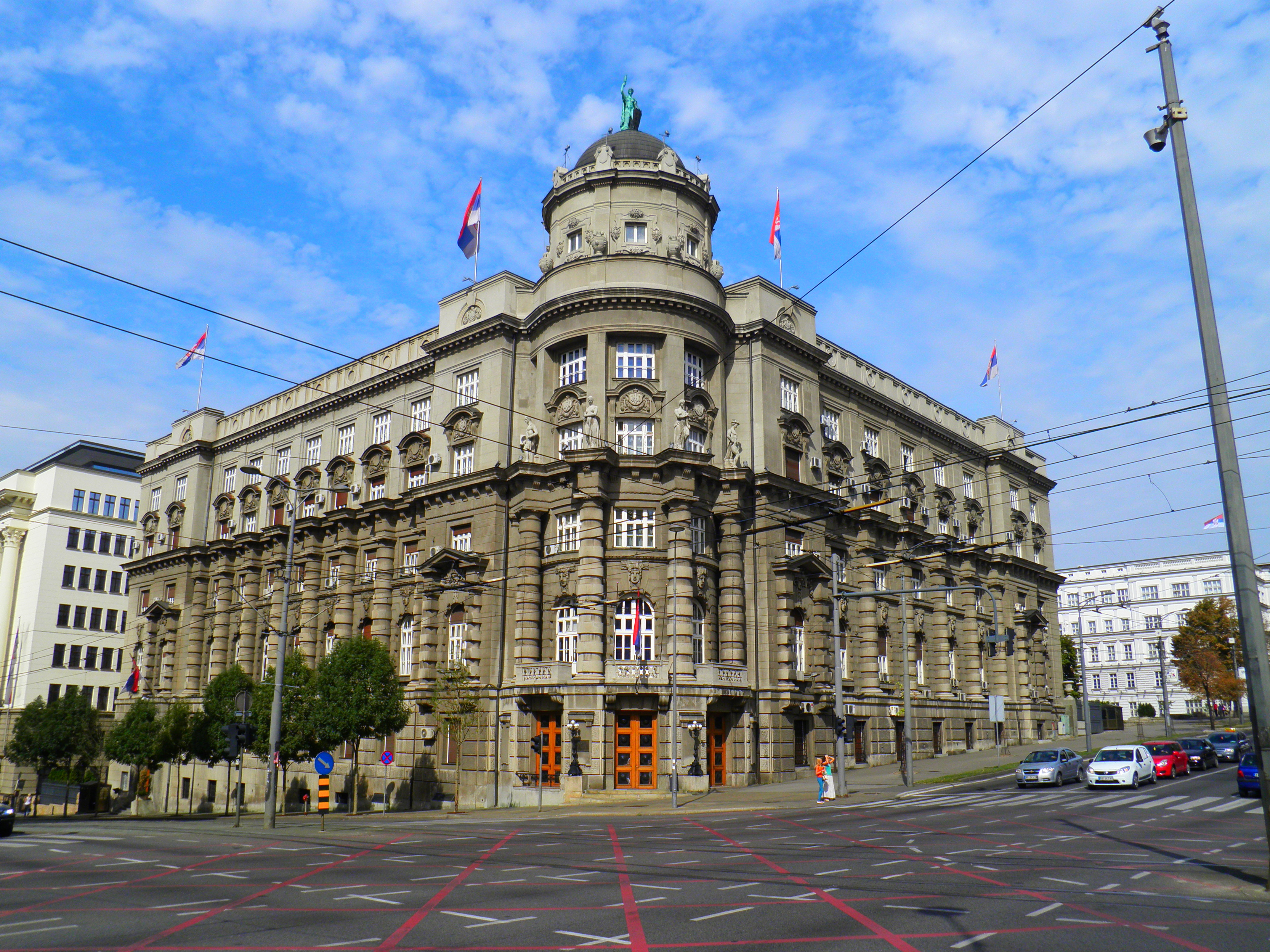 Zgrada vlade